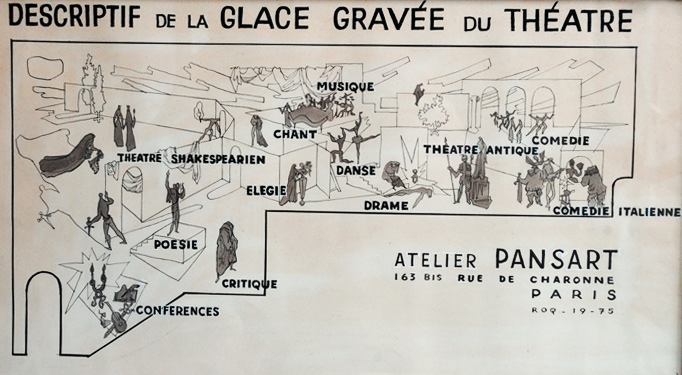 Descriptif du verre gravé du Théâtre de Poitiers